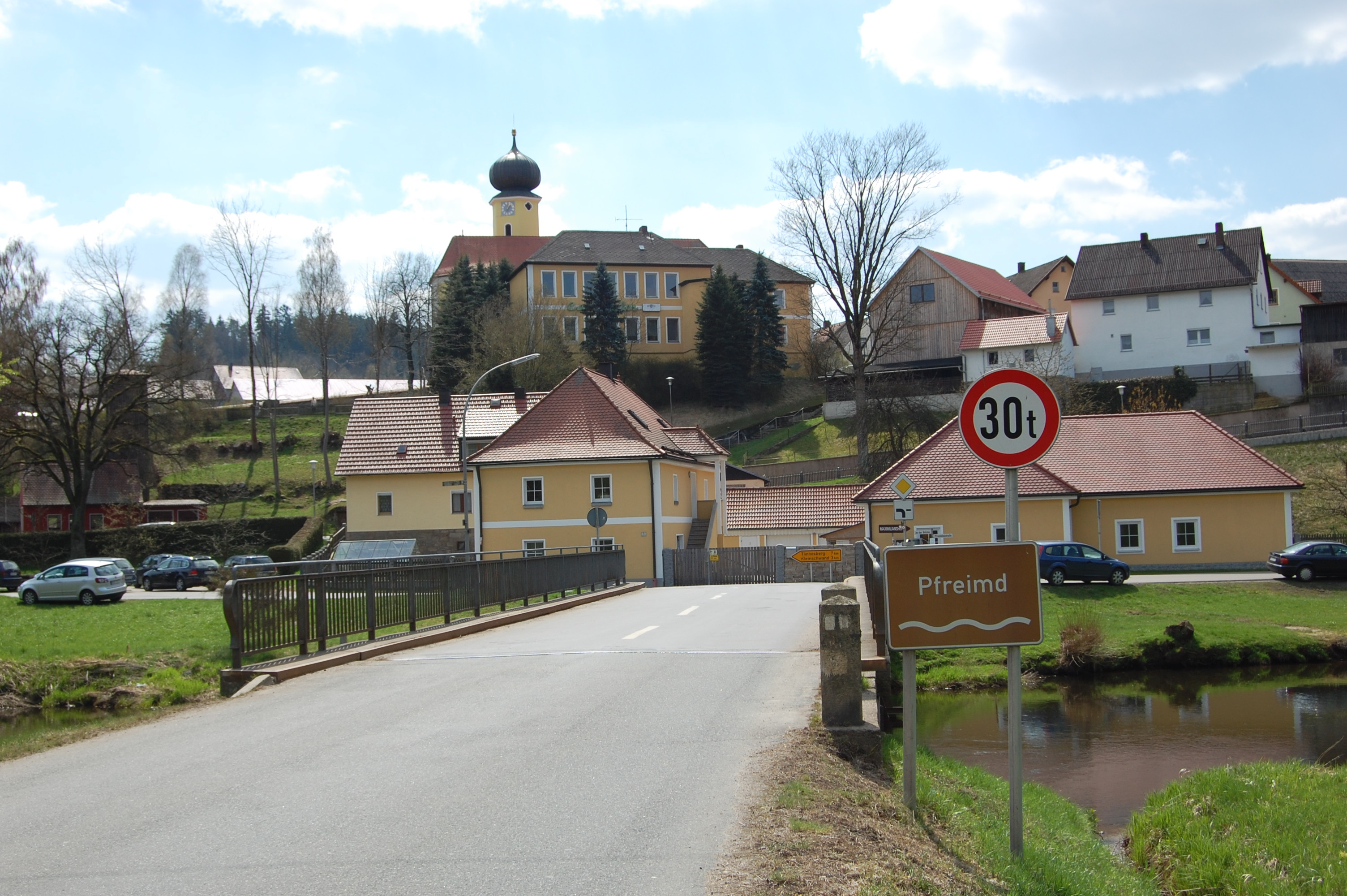 Böhmischbruck (2011)